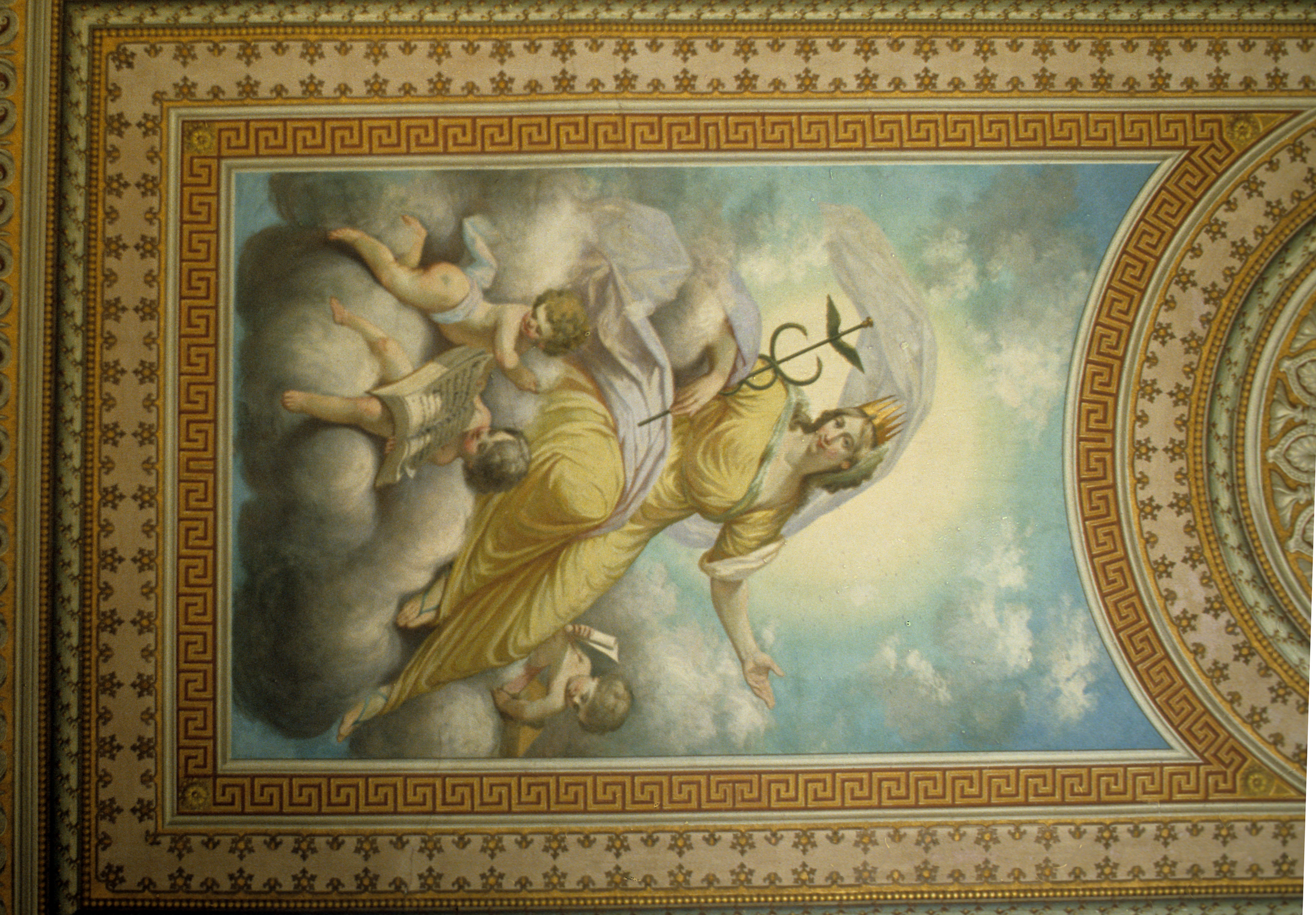 Palau March de Reus de la Rambla. Plafó pintat del saló pricipal que dóna a la Rambla.